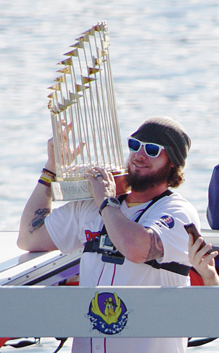 Jarrod Saltalamacchia